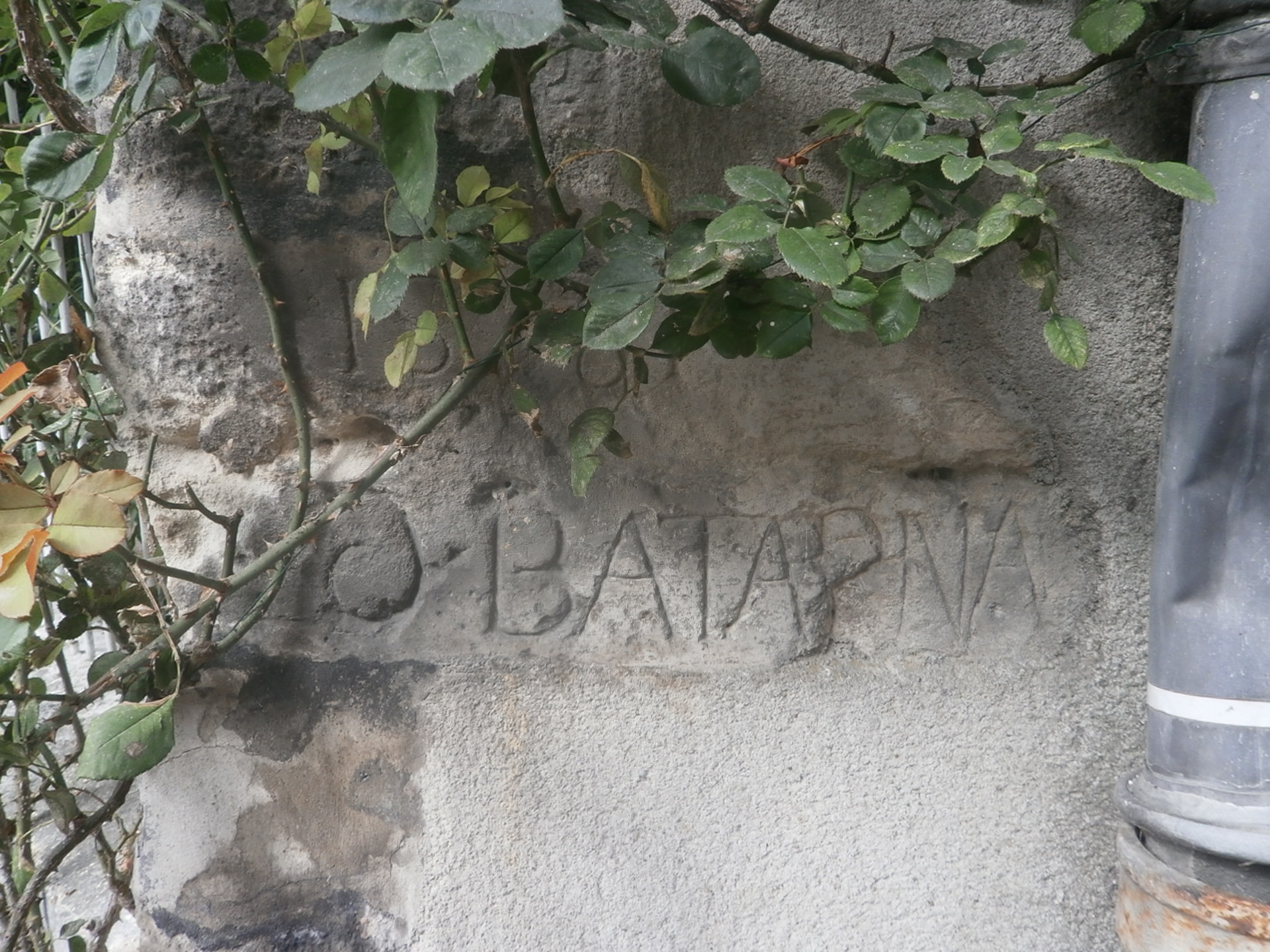 Inscription gravée sur une pierre d'angle de la mairie : 1581 F. DE BATARNAI